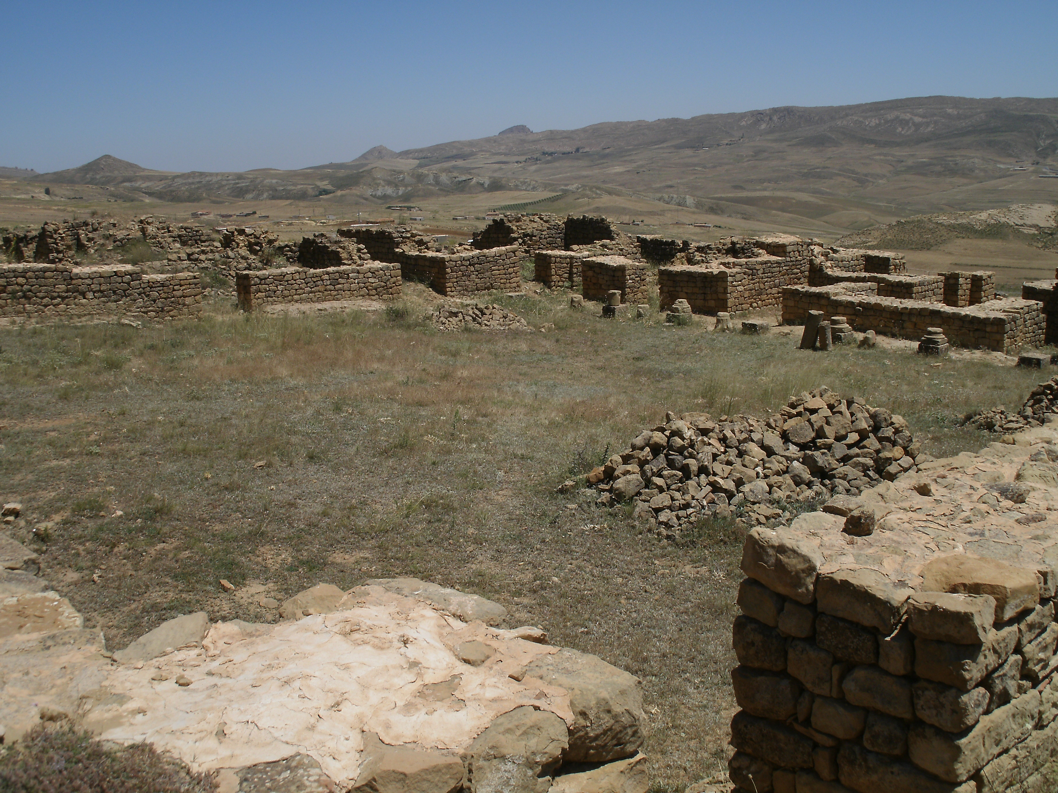 La cour du palais de Ziri